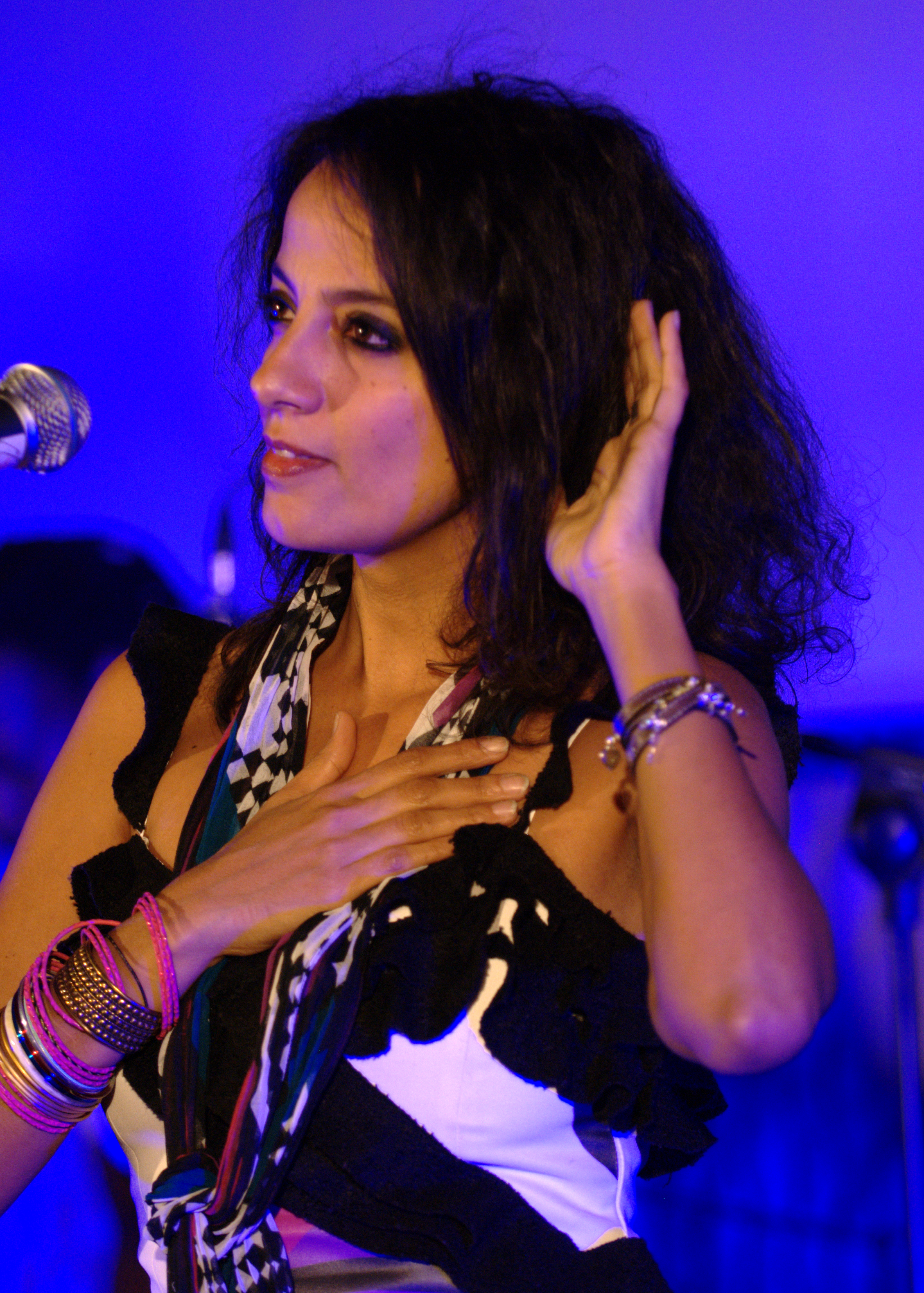 La cantante italo-etiope Saba Anglana a Trento per le "Note d’Africa", un concerto gratuito organizzato da Soroptmist International in collaborazione con la Fondazione Cassa di Risparmio di Trento e Rovereto, la Cooperazione Trentina e AMREF Italia.